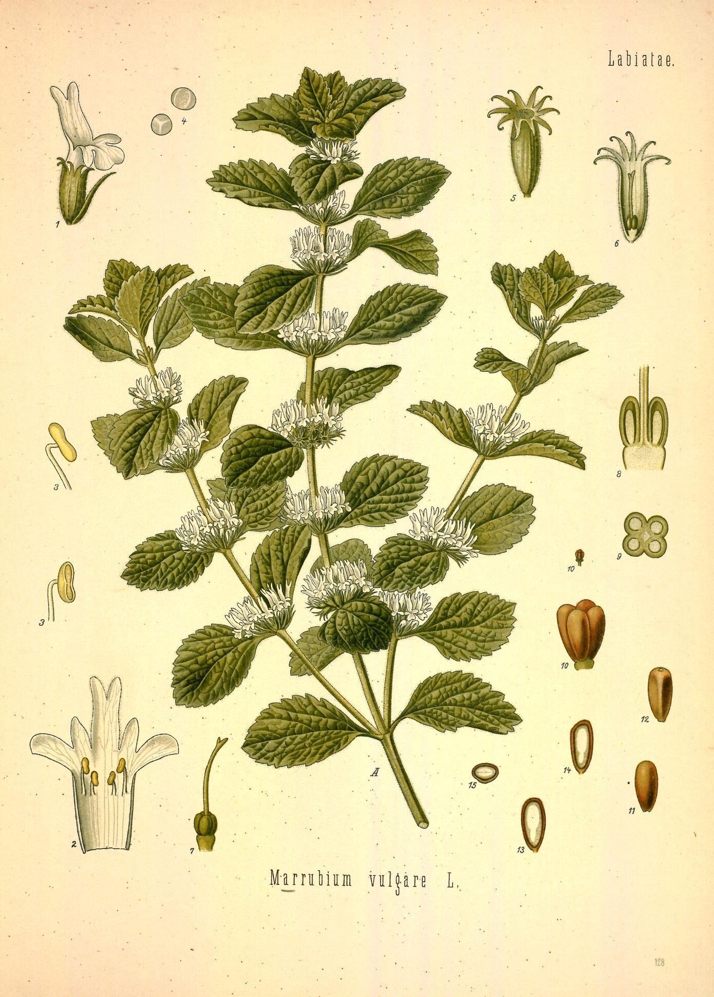 Andorn. A Theil der blühenden Pflanze, nat. Grösse; 1 Blüthe, vergrössert; 2 Krone zerschnitten und auseinandergebreitet, desgl.; 3 Staubgefässe, desgl.; 4 Pollen, desgl.; 5 Kelch, desgl.; 6 Kelch zerschnitten, mit Stempel, desgl.; 7 Stempel, desgl.; 8 unterer Theil des Stempels mit 2 Carpellen im Längsschnitt, desgl.; 9 derselbe im Querschnitt, desgl.; 10 Nüsschen, natürl. Grösse und vergrössert; 11 und 12 einzelnes Nüsschen von verschiedenen Seiten, desgl.; 13 und 14 dasselbe im Längsschnitt, desgl.; 15 dasselbe im Querschnitt, desgl.